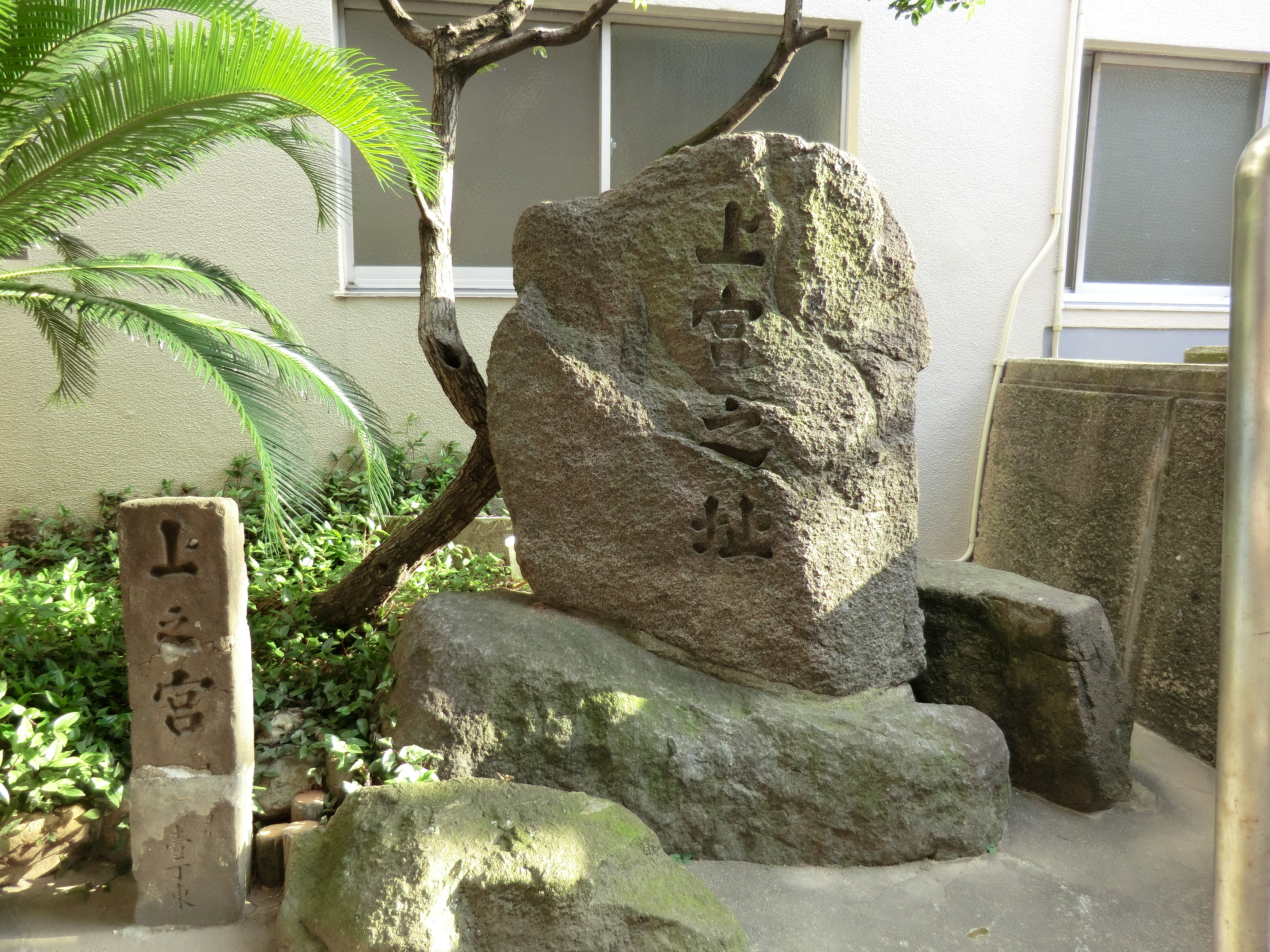 上之宮址碑（上野王子跡）